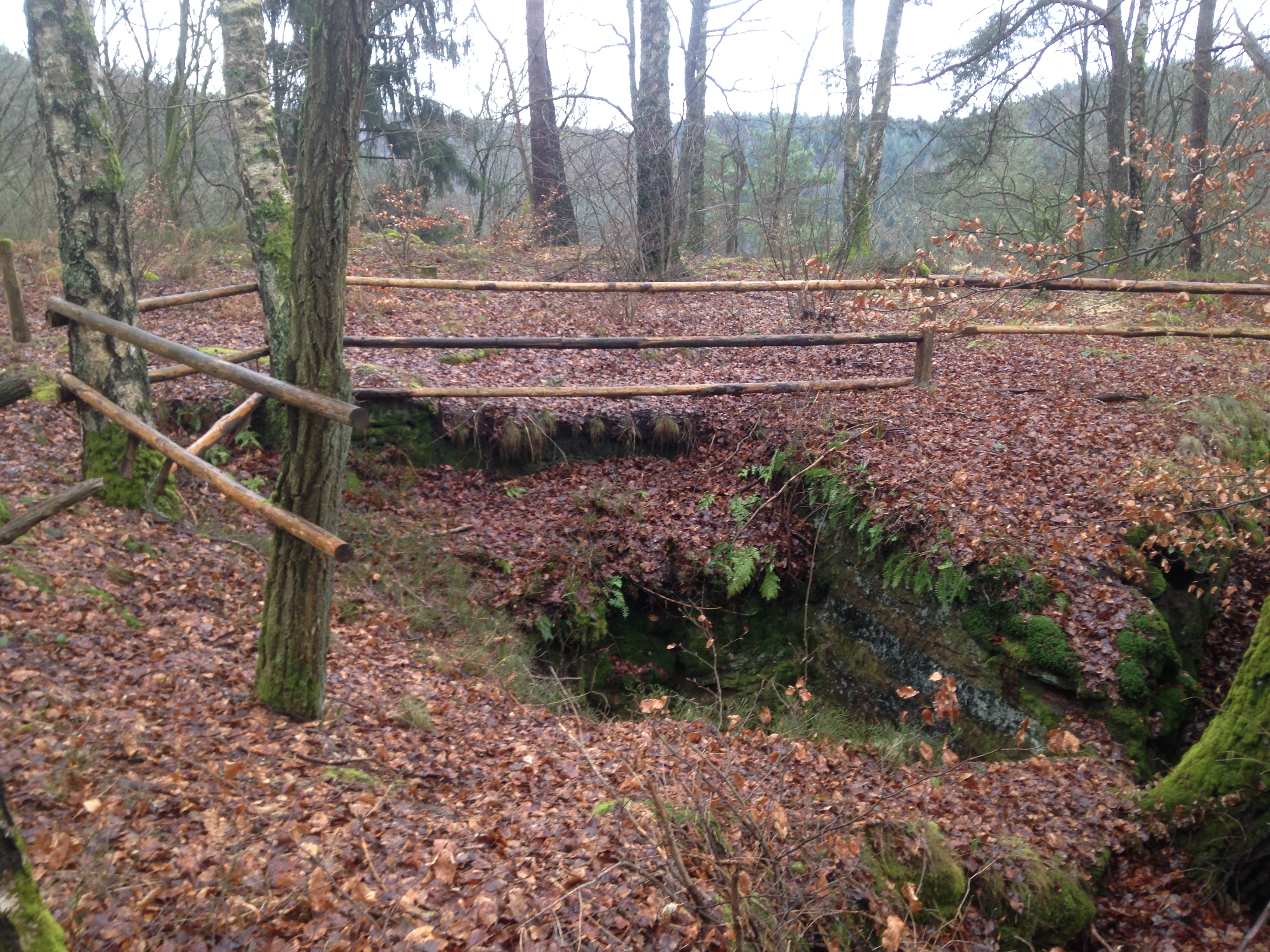 Die ehemalige Zisterne der Heidelsburg mit Holzgeländer (~ 4-5 Meter tief)